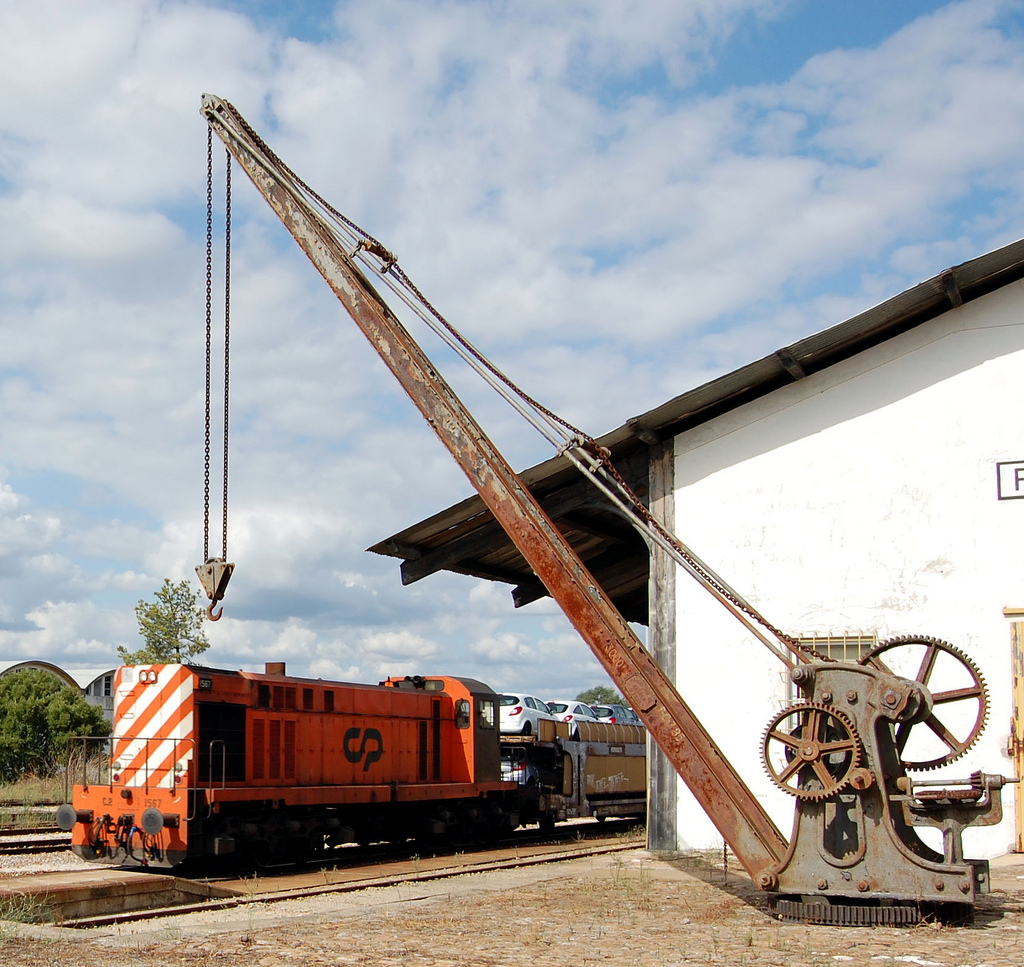 Comboio na Estação de Ponte de Sor.